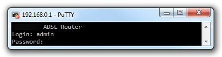 Монгол: telnet